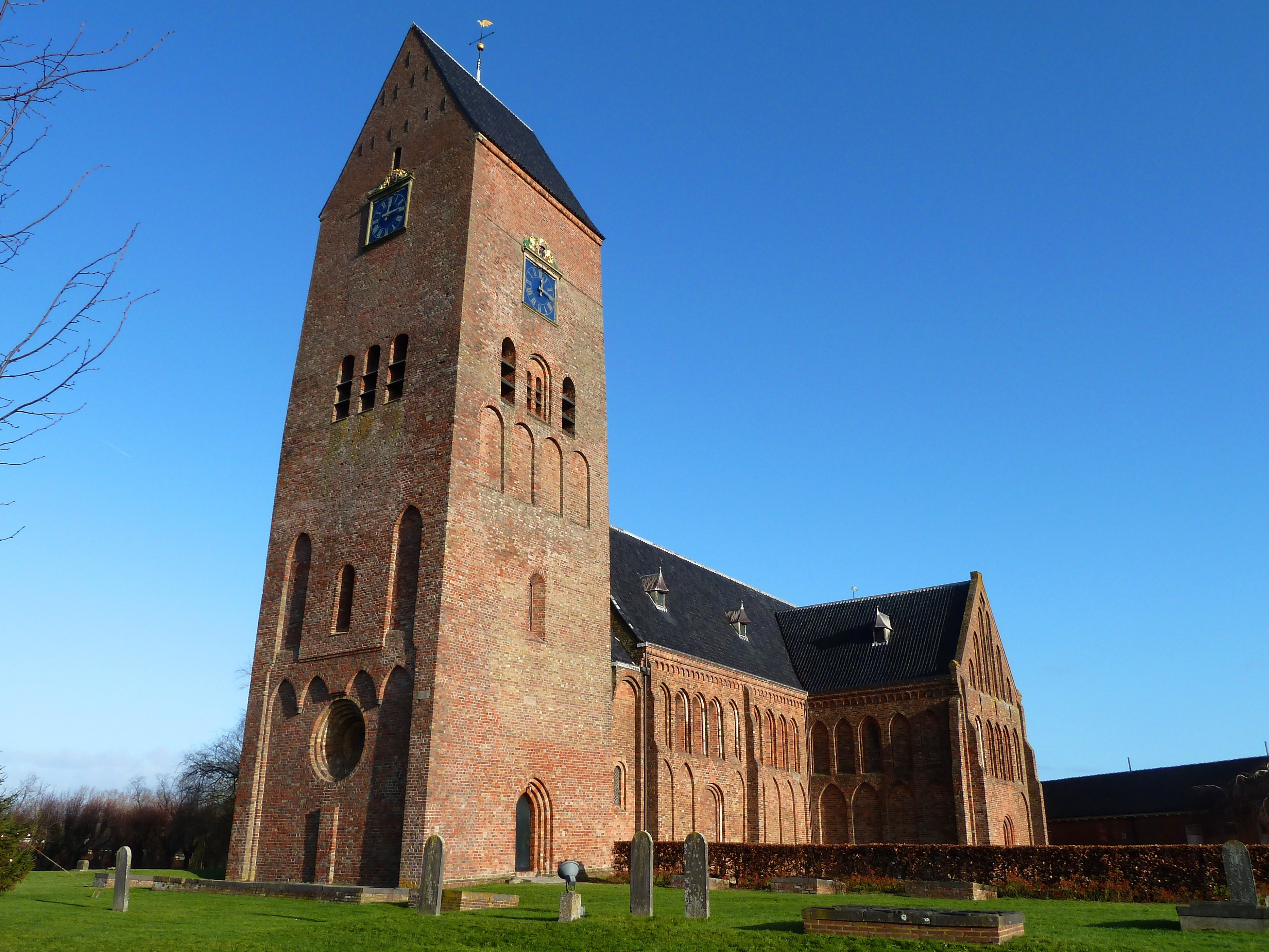 Hervormde Bartholomeuskerk van Stedum